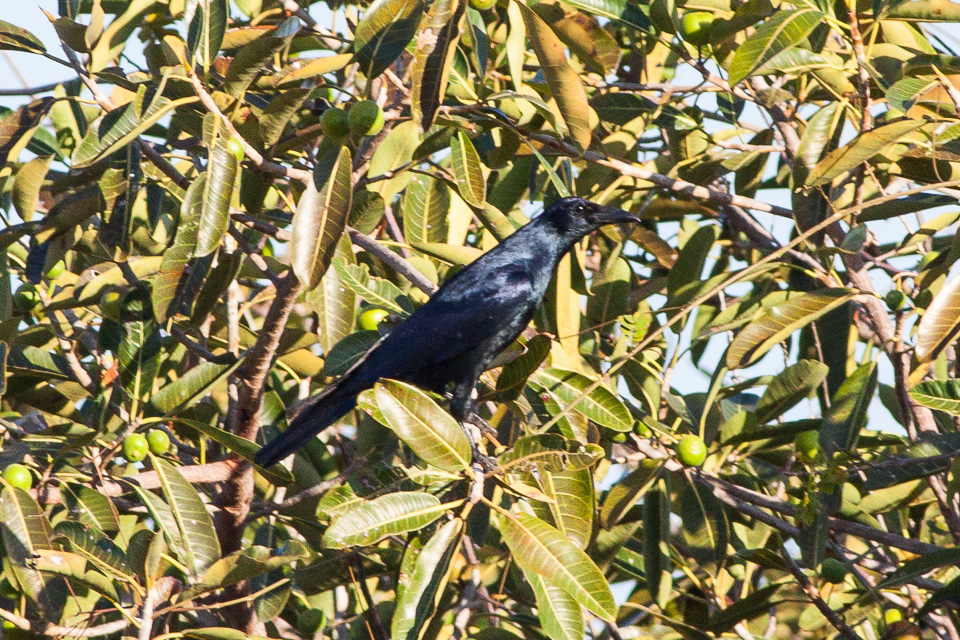 Journey to La Barra de Navidad,Jalisco